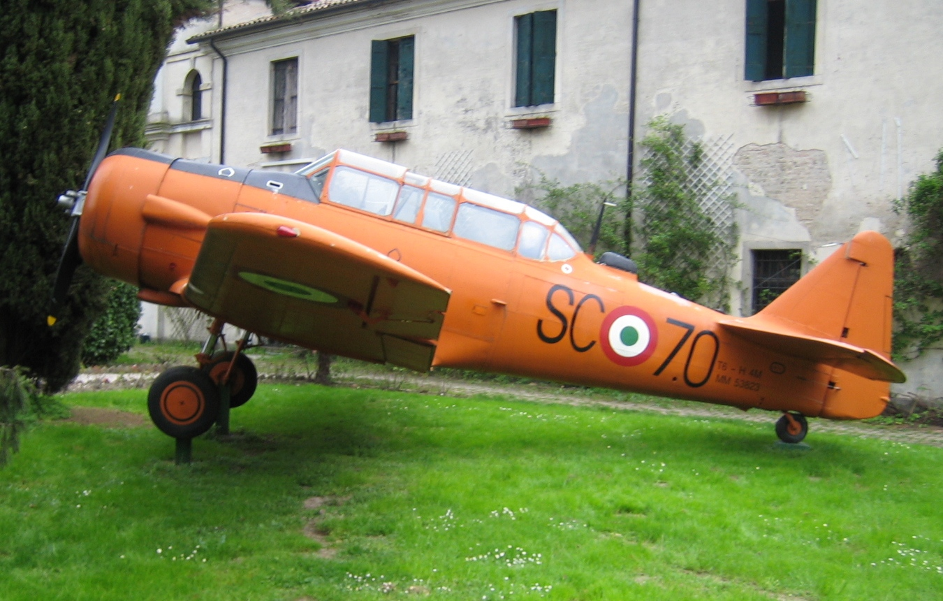 Museo dell'Aria e dello Spazio presso il Castello di San Pelagio.